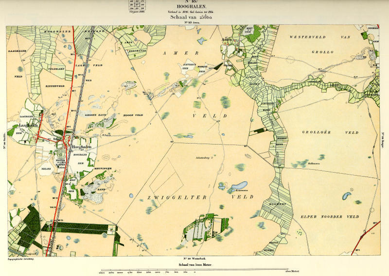 Bonnebladen 1:25.000 Anno 1900 Hooghalen 187